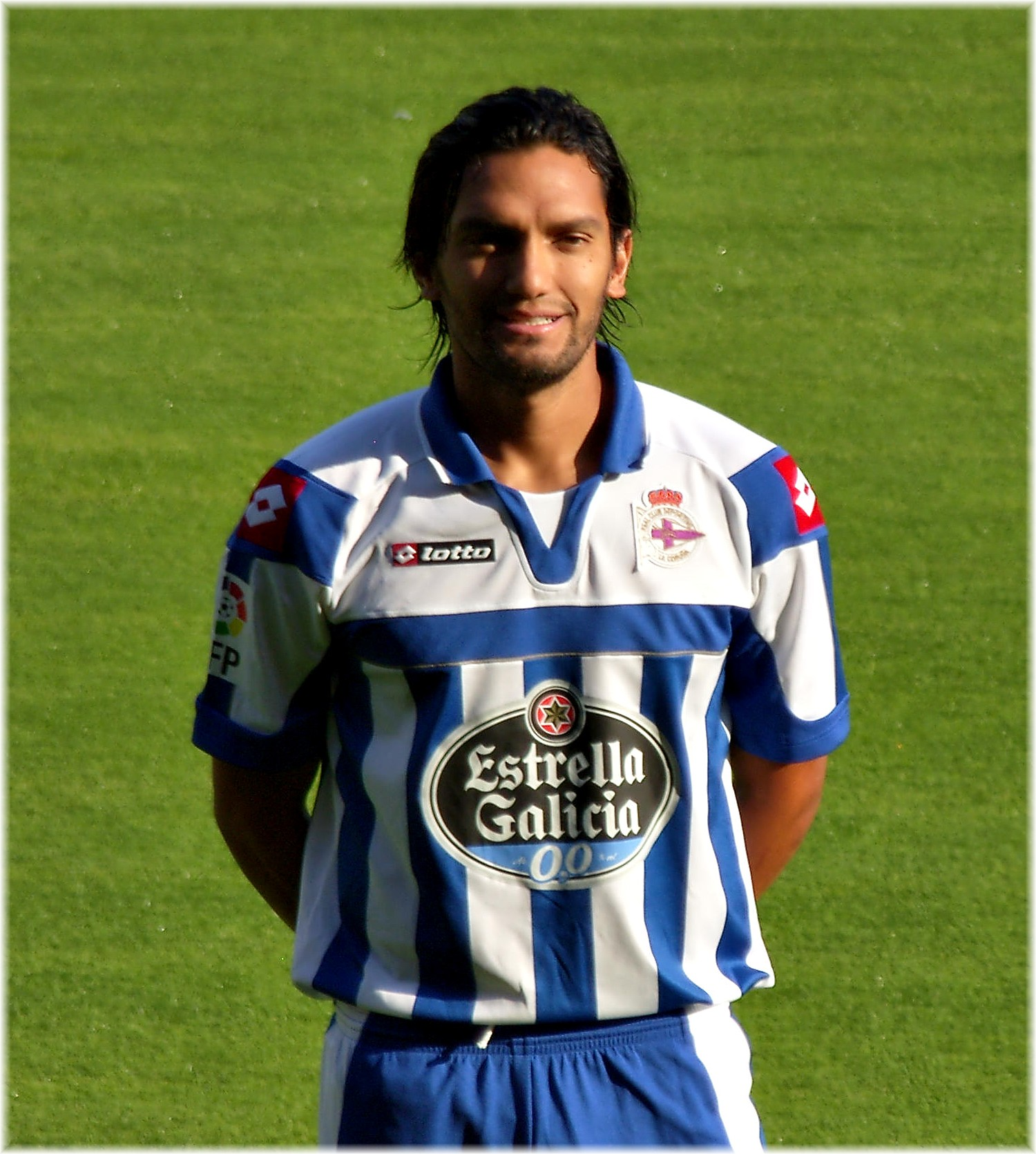 Presentació del jugador del Depor, cedit per l'Hèrcules, Abel Aguilar